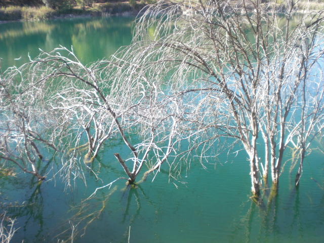 Laguna de Ruidera